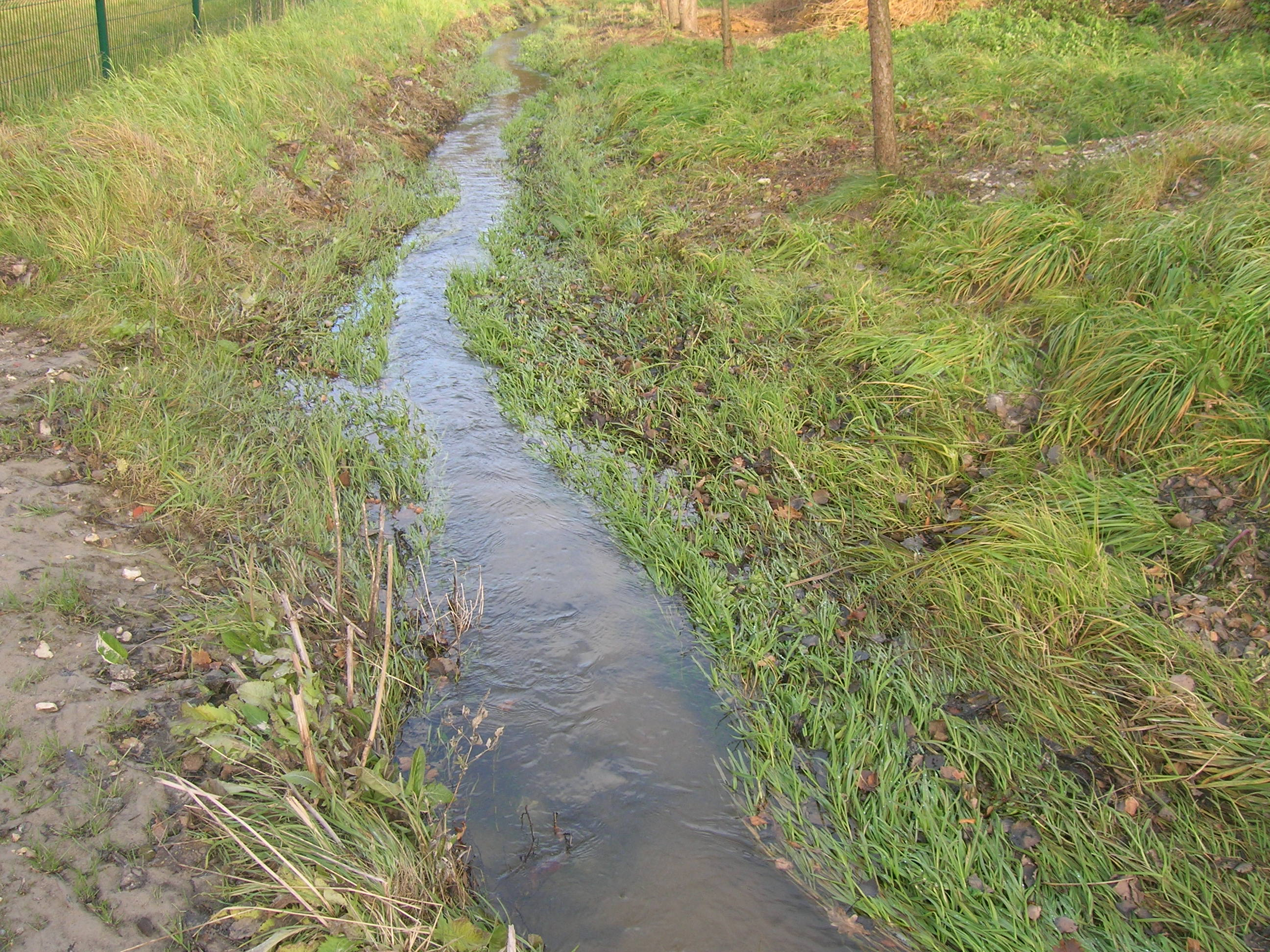 Borowcówka